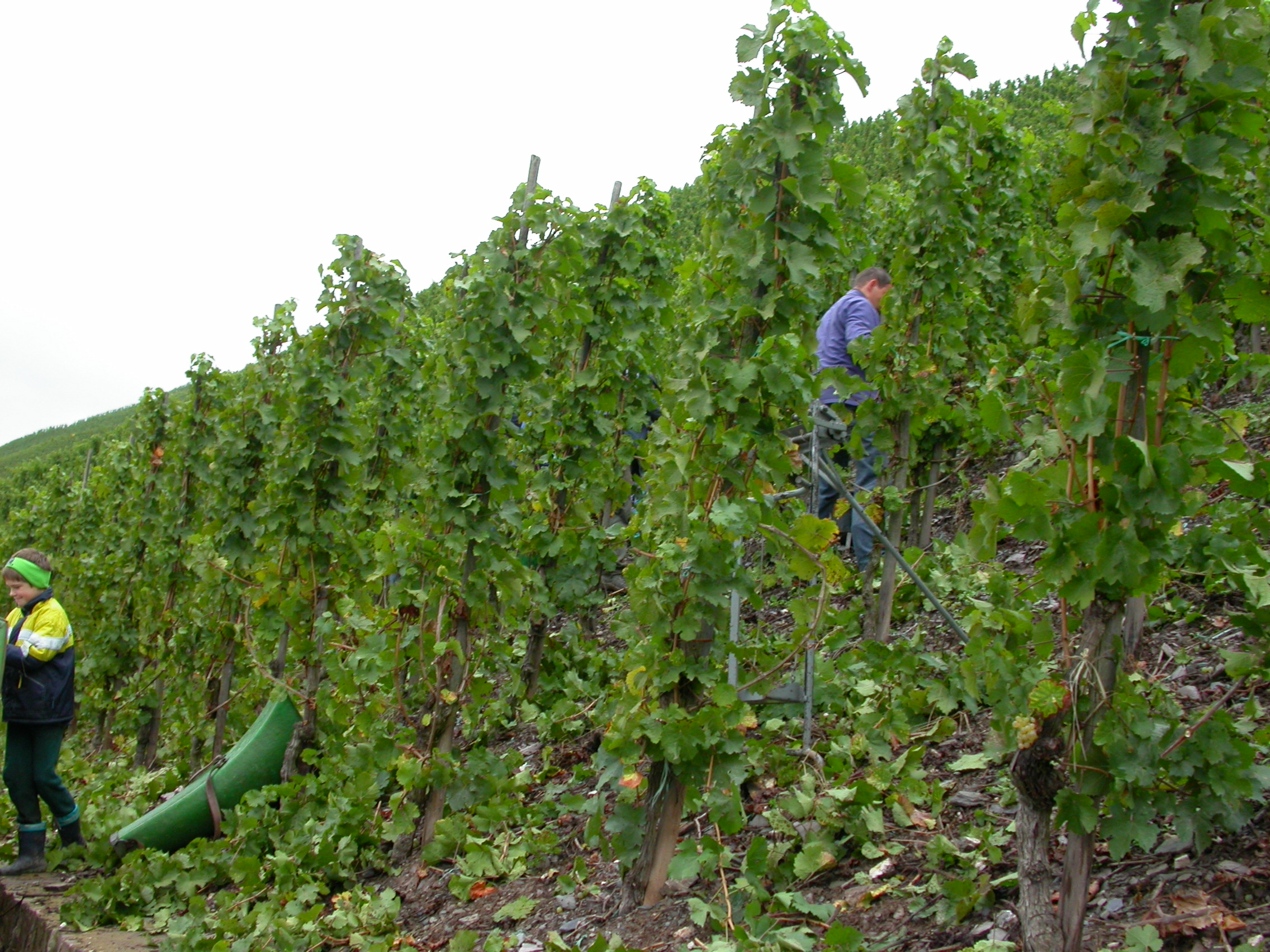 Weinreben Pfahlerziehung